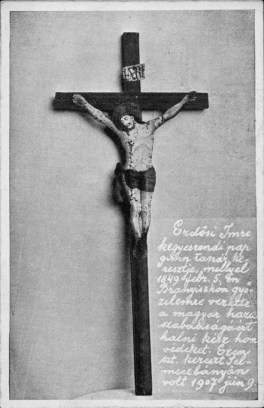 Levelező lap Erdősi Imre keresztjéről („Erdősi Imre kegyesrendi pap, gimn. tanár keresztje, mellyel 1849. feb. 5-én Branyiszkónál győzelemre vezette a magyar haza szabadságáért halni kész honvédeket. Ezen kereszt Selmecbányán volt 1907. jún. 9.”)